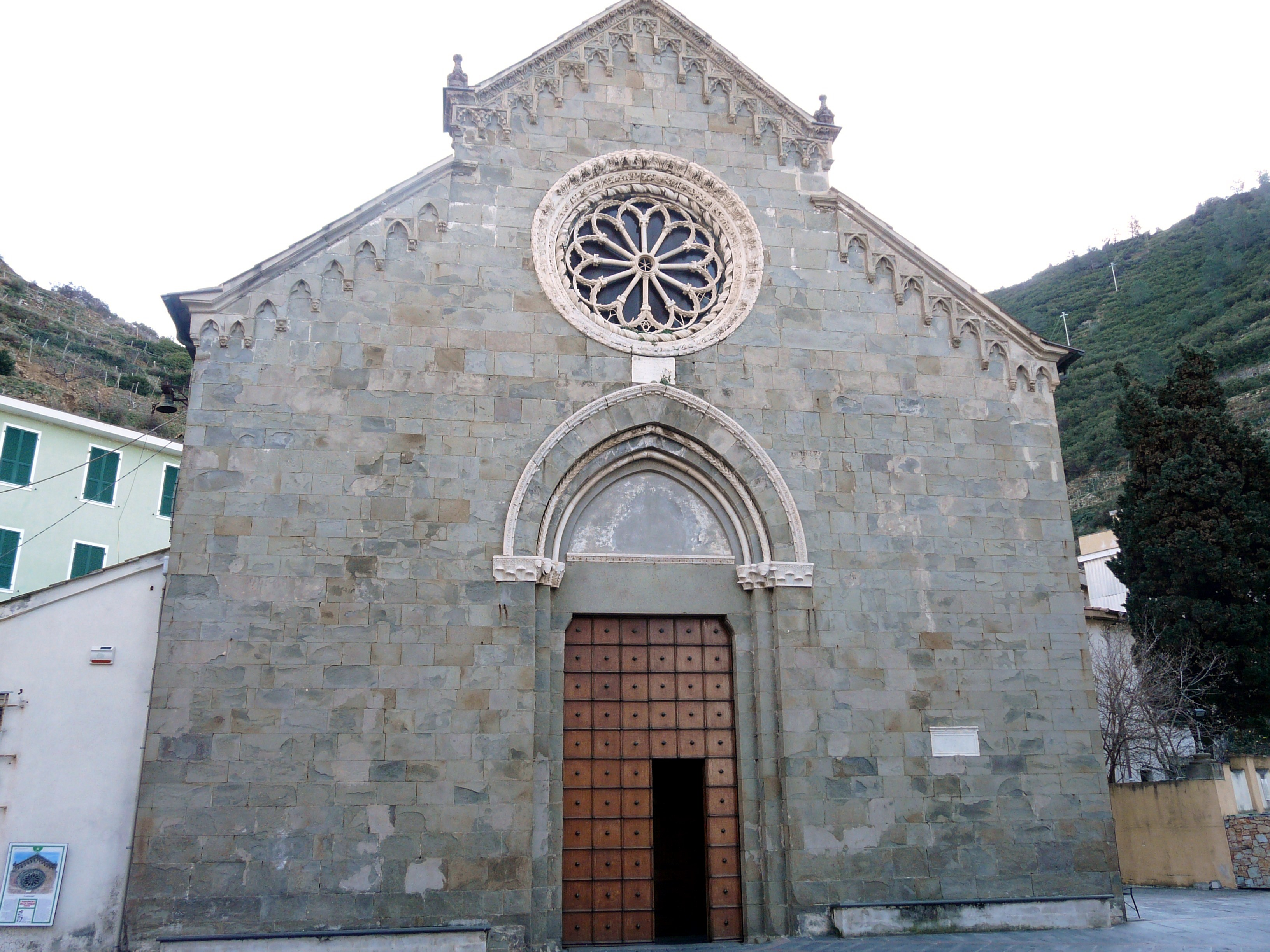 Chiesa di San Lorenzo, Manarola, Cinque Terre, La Spezia, Liguria, Italia